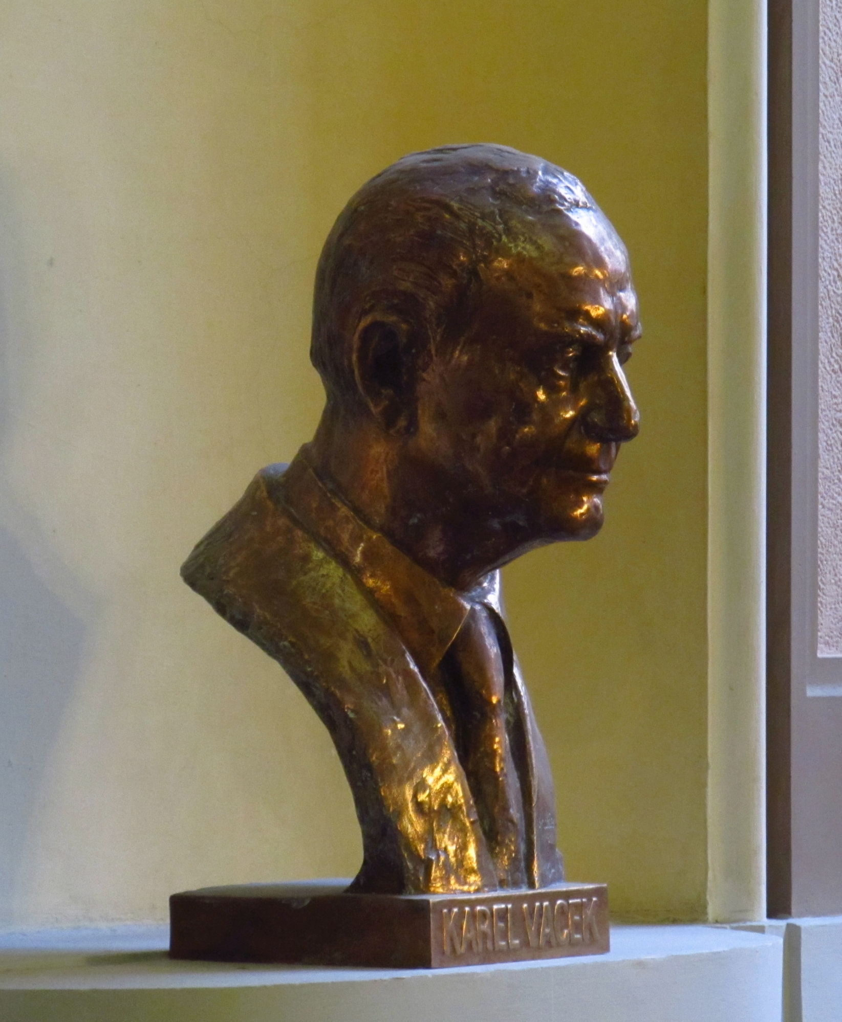 Umístění: schodiště liberecké radnice